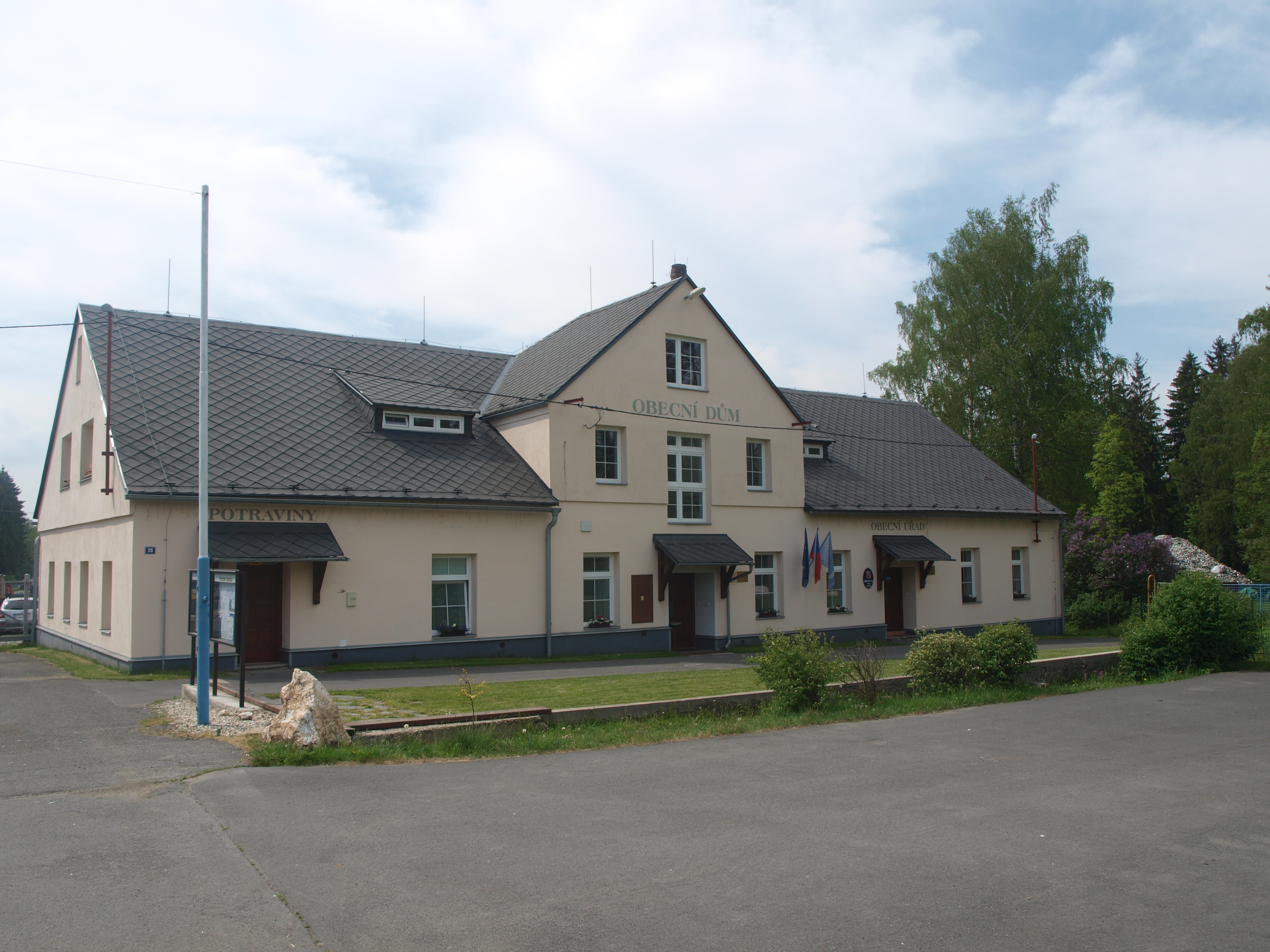 Obecní úřad v obci Malá Štáhle